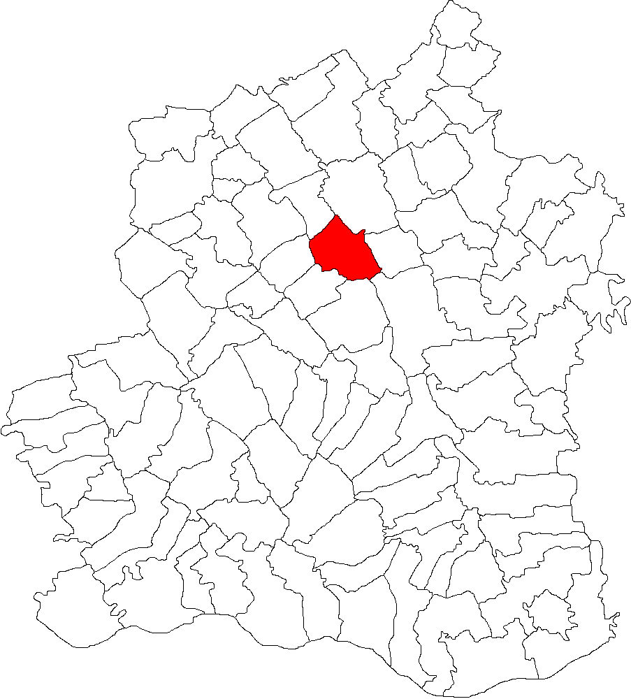 Categorie:Hărţi ale judeţului Teleorman